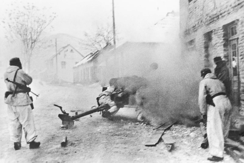 Vom Bandenkrieg in Bosnien Mitten auf der Strasse einer von Banden besetzten Ortschaft ist deutsche schwere Pak aufgefahren und bekämpft erfolgreich die von den Banditen noch gehaltenen Widerstandnester. PK-Kriegsberichter Thiede, Scherl Bilderdienst 12.1.1944 [Herausgabedatum] Information added by Wikimedia users.Srpskohrvatski / српскохрватски: Protivtenkovski top 1. brdske divizije za vreme uličnih borbi protiv partizana u Bosni, tokom zimskih antipartizanskih operacija 1943/1944.